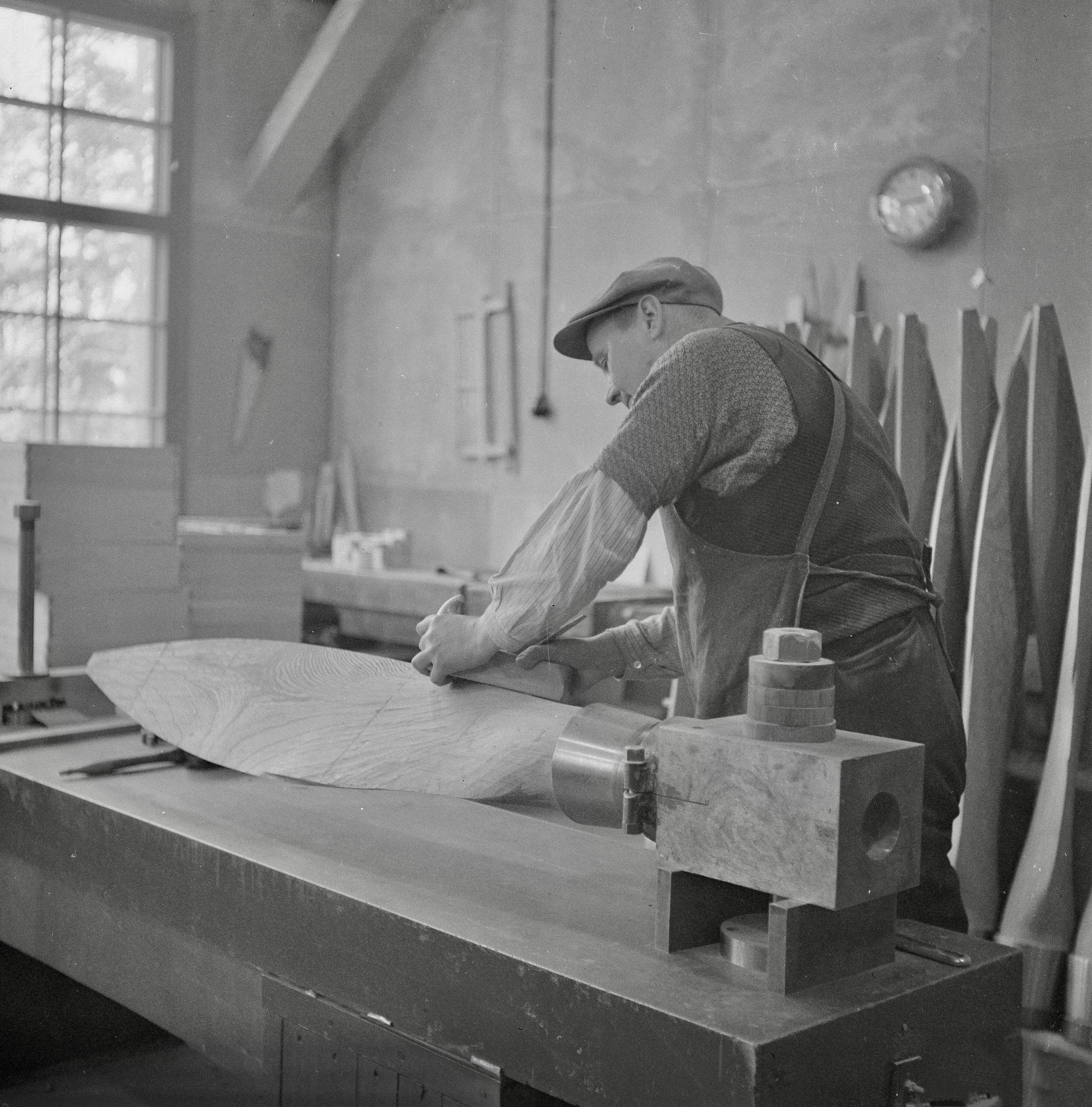 Potkuria valmistetaan. Kuvauspaikka: Tampere, Valtion lentokonetehdas